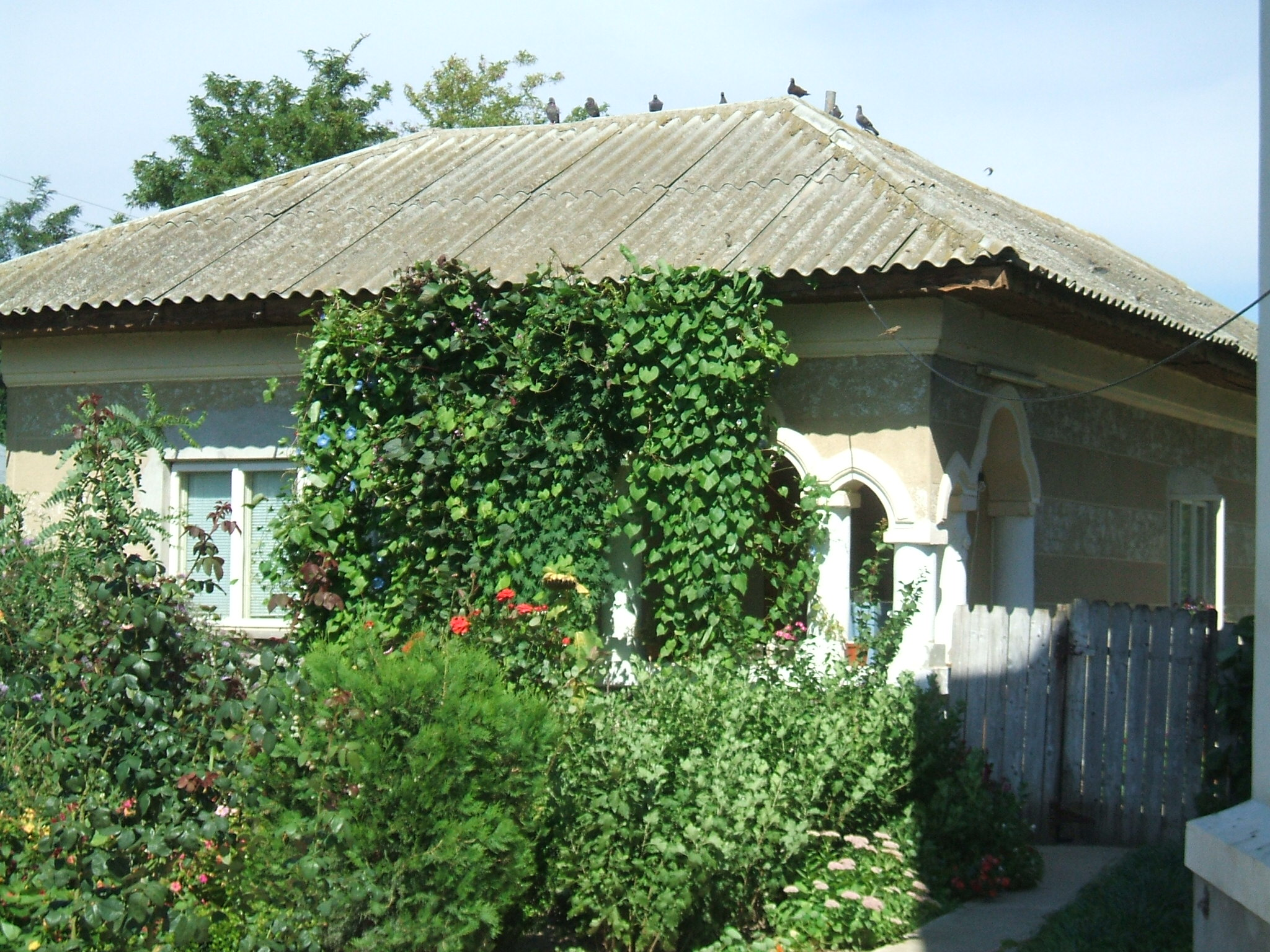 Biserica "Sfantul Ierarh Nicolae" din Rasa, construita intre 1936-1937 pe acelasi amplasament cu o biserica mai veche, din secolul XIX, de la care a preluat catapeteasma.